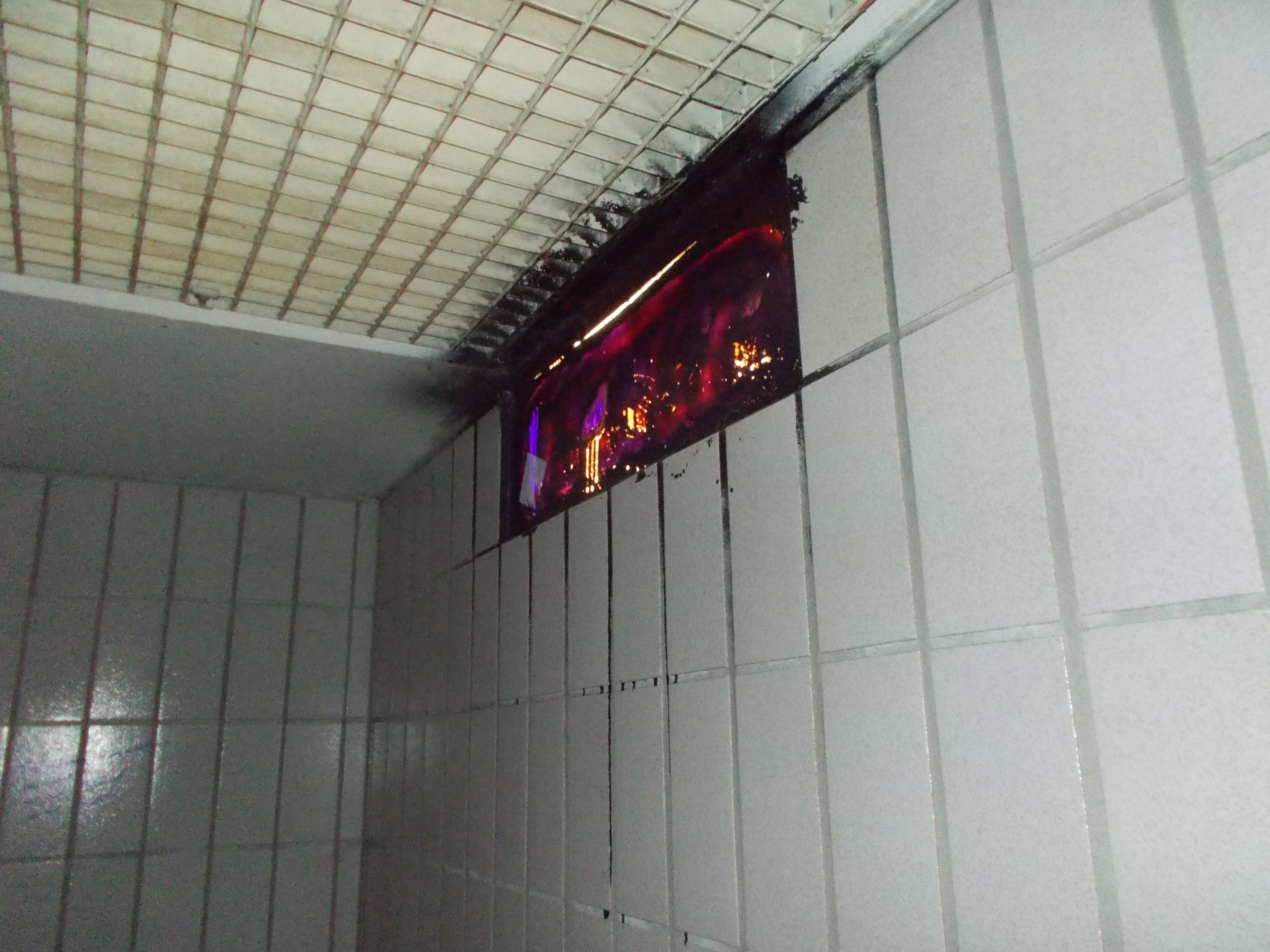 Beschmierte Lampe in der Herrentoilette des Rastplatzes Korb der B14 in Richtung Winnenden